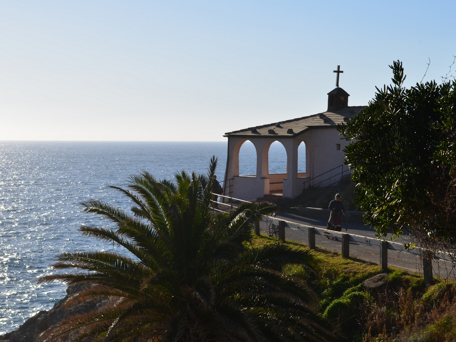 Cappella della Madonnina della Punta, Bonassola